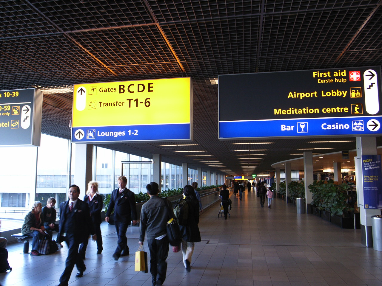 Aeropuerto de Schiphol (Amsterdam) donde se aprecian los elementos de señalización diseñados por Paul Mijksenaar